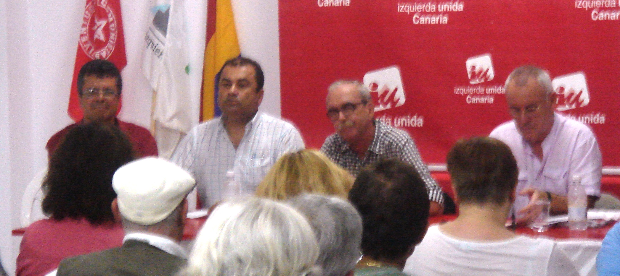 Joaquín Sagaseta, Germán Santana Pérez & Cayo Lara